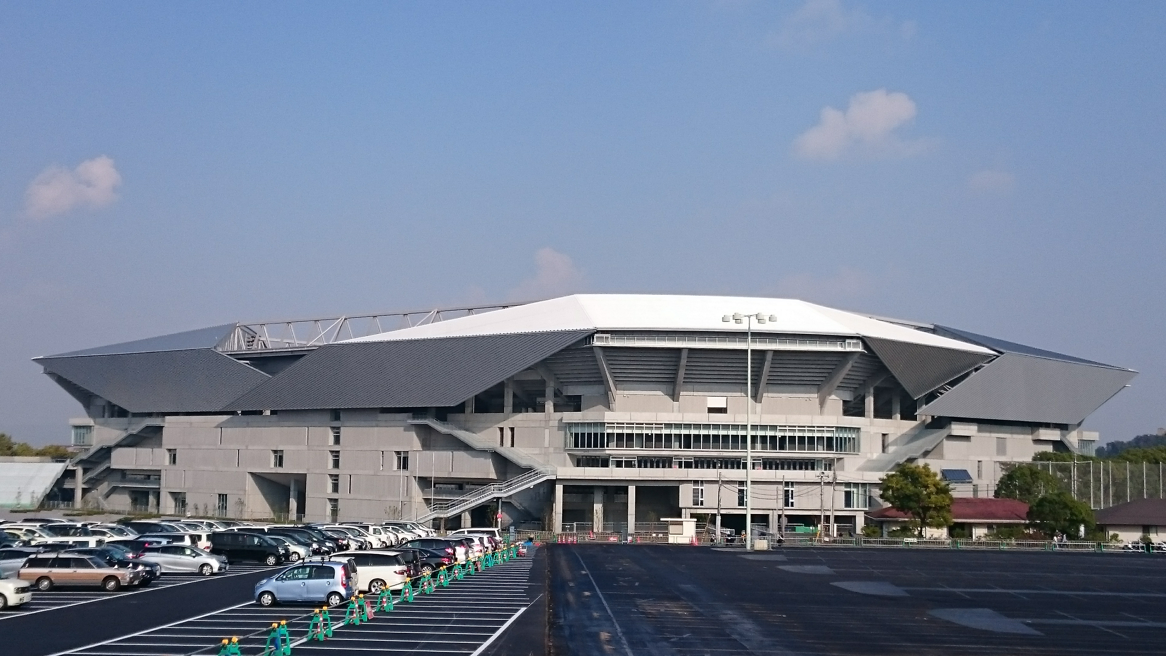 市立吹田サッカースタジアム全景